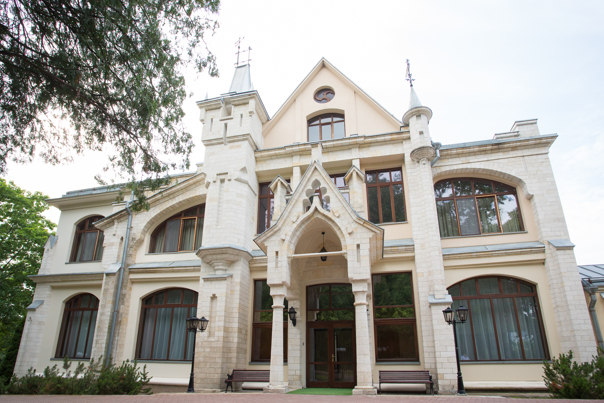 Архитектор С.М. Гончаров